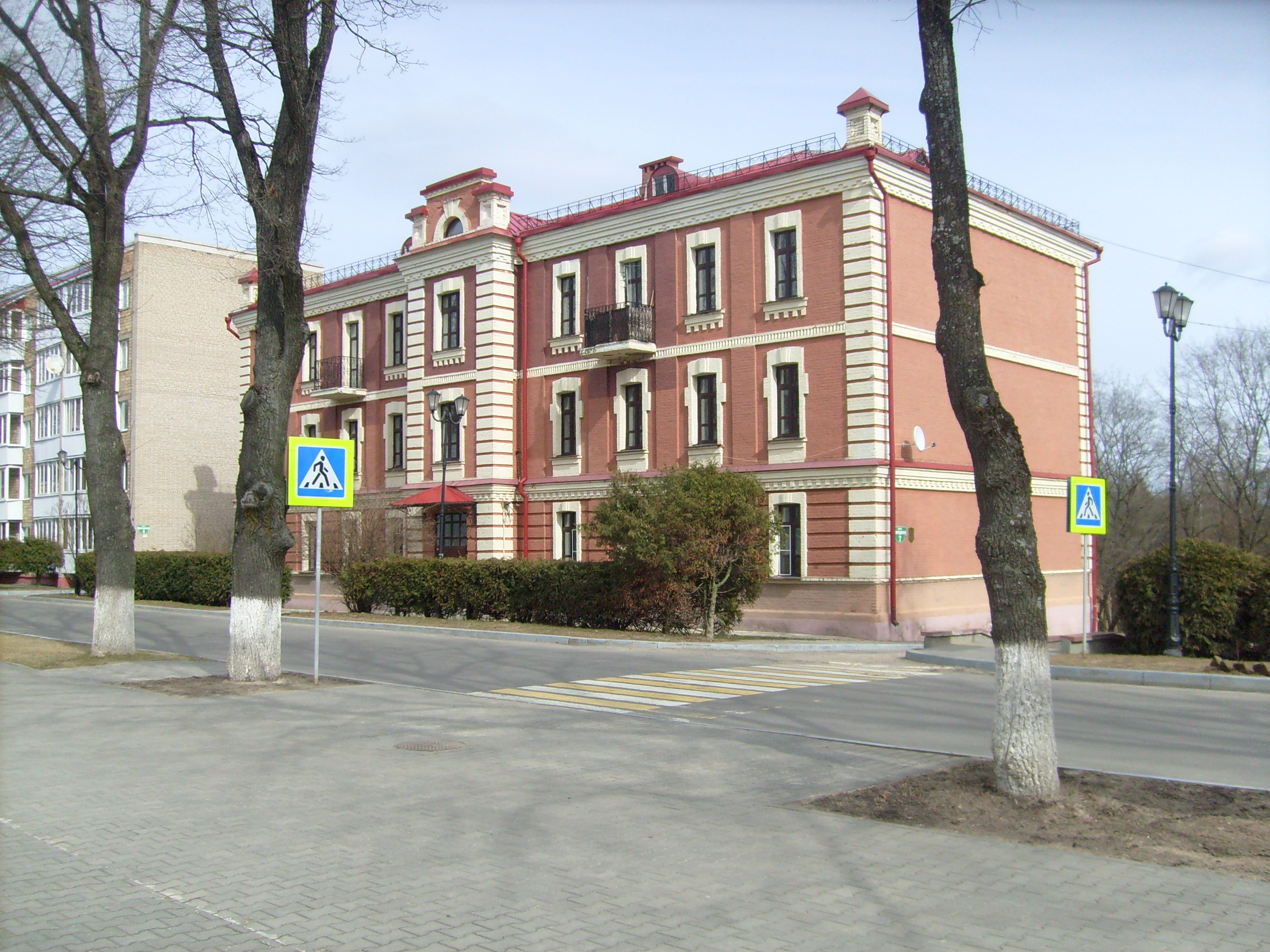 Белорусская сельскохозяйственная академия. Бывший профессорский корпус, улица Мичурина, 2